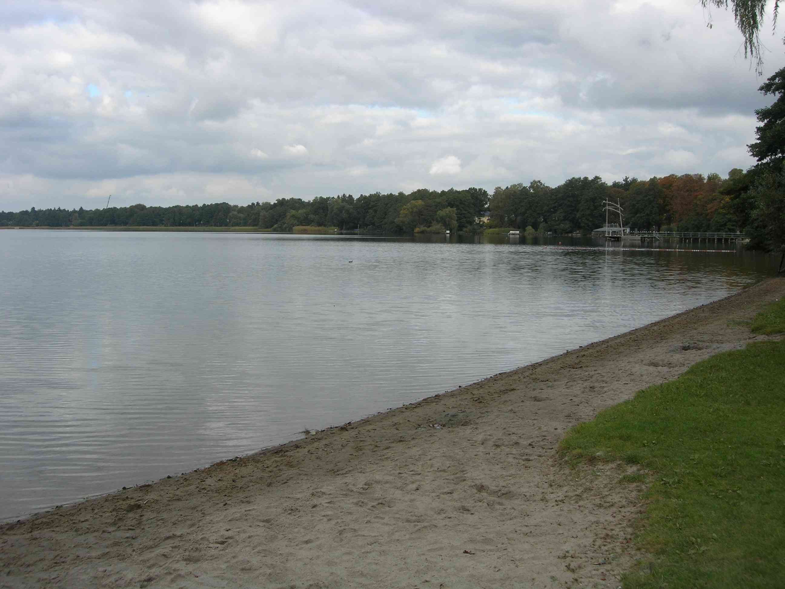 Der Wandlitzsee in Wandlitz